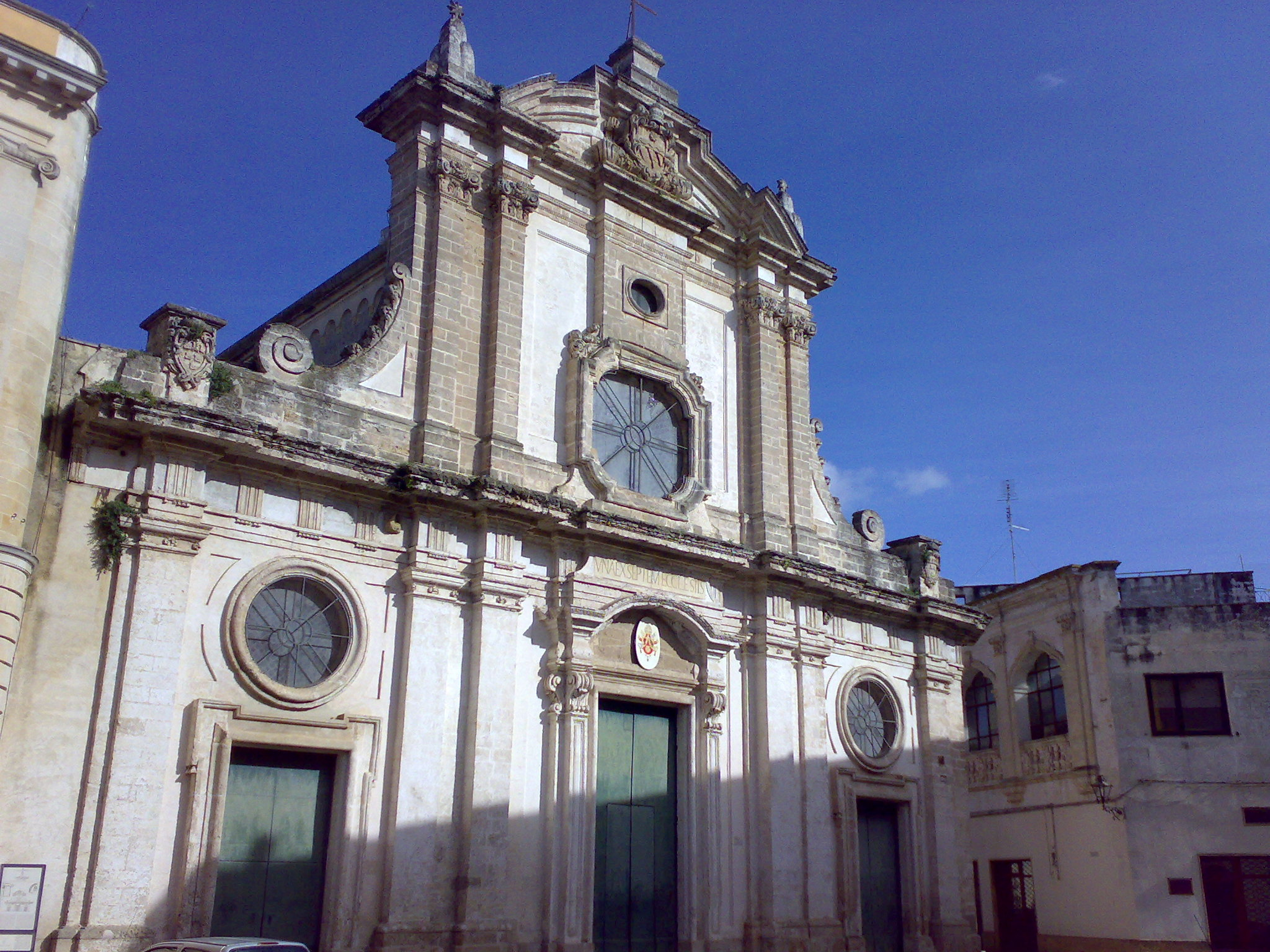 Cattedrale di Nardò